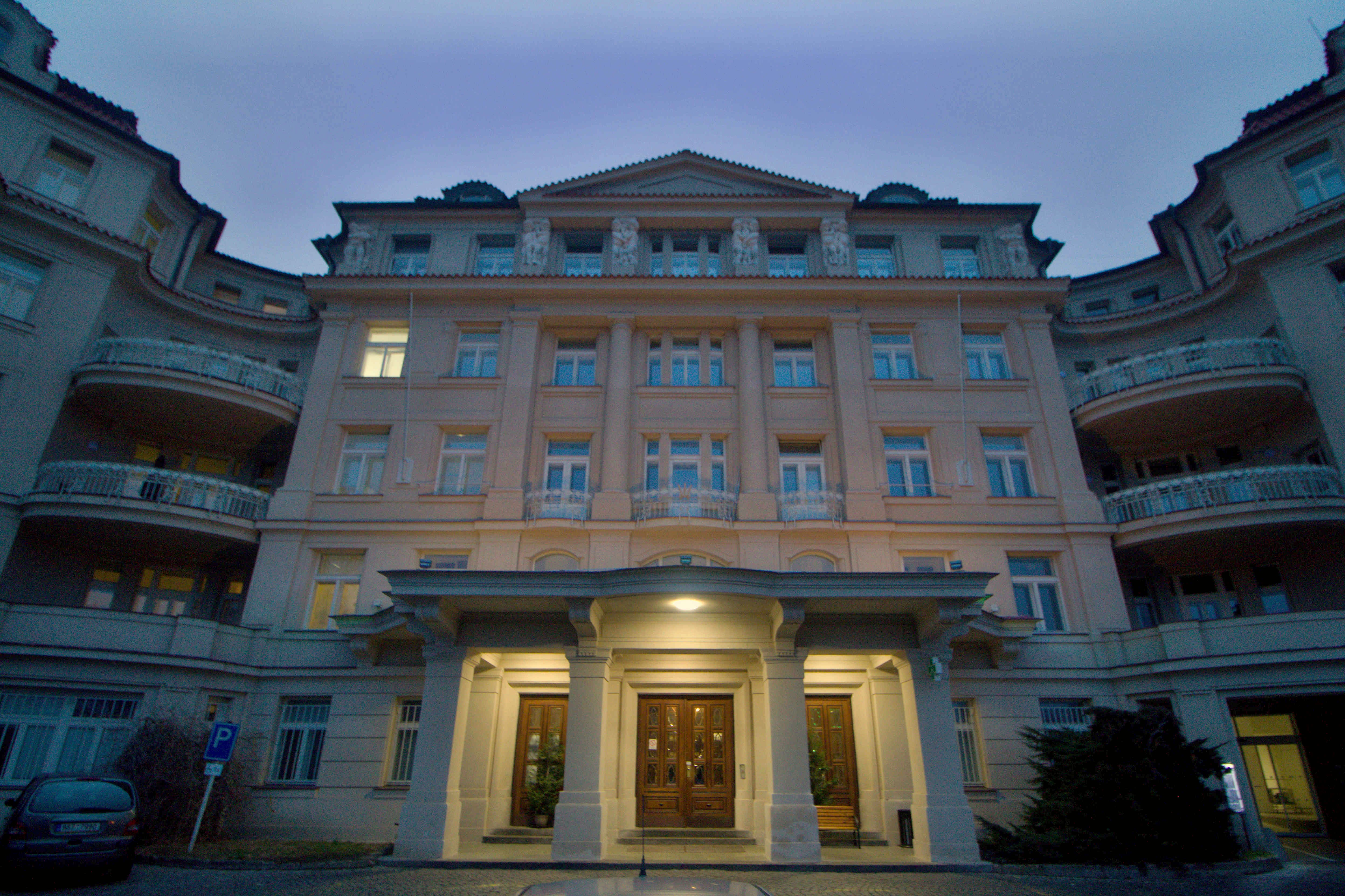 Ústav pro péči o matku a dítě v Praze 4-Podolí